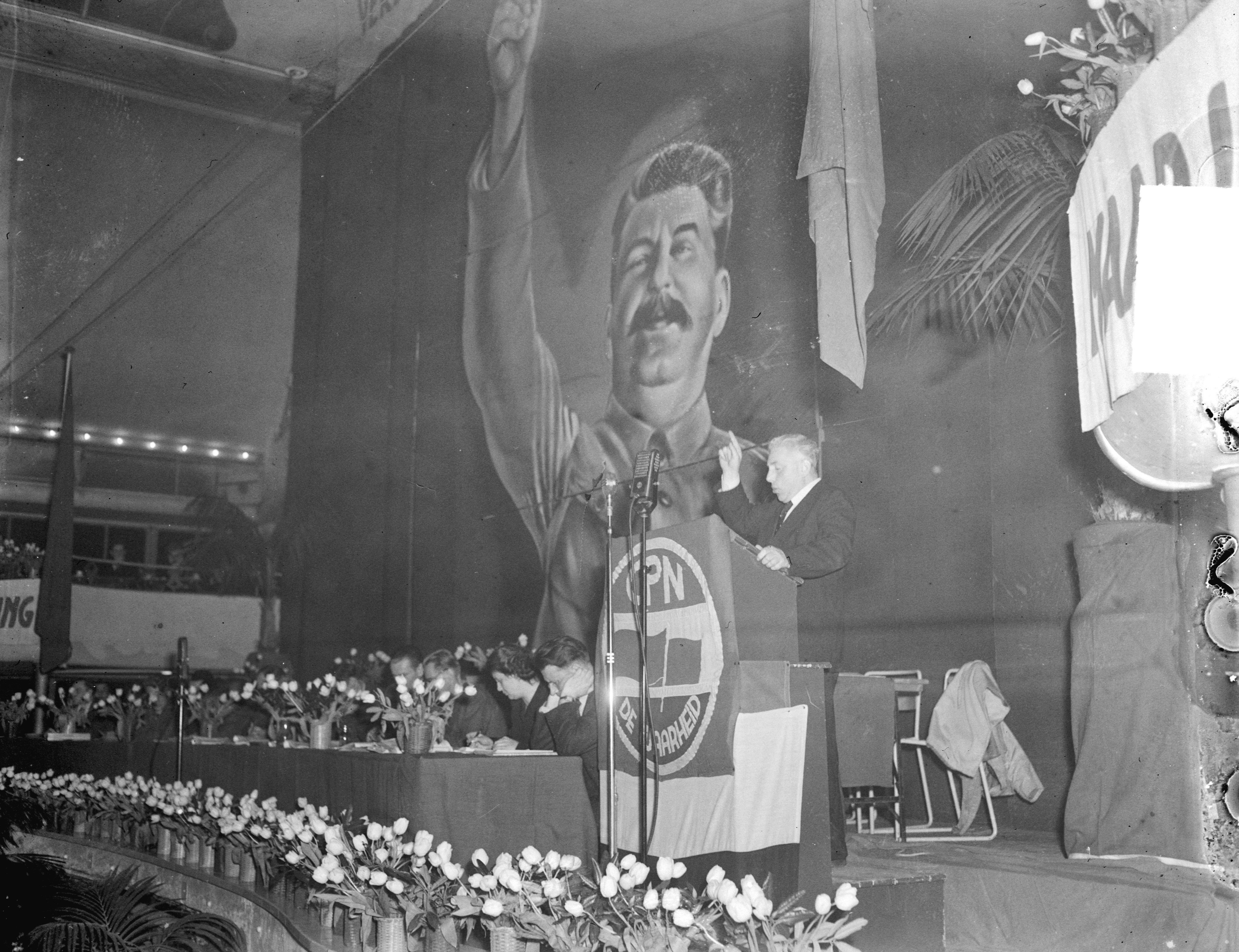 Collectie / Archief : Fotocollectie Anefo Reportage / Serie : [ onbekend ] Beschrijving : Paul de Groot spreekt op CPN-congres Datum : 26 februari 1950 Persoonsnaam : Groot, Paul de Fotograaf : Hartog, […] / Anefo Auteursrechthebbende : Nationaal Archief Materiaalsoort : Negatief (zwart/wit) Nummer archiefinventaris : bekijk toegang 2.24.01.04 Bestanddeelnummer : 903-8439